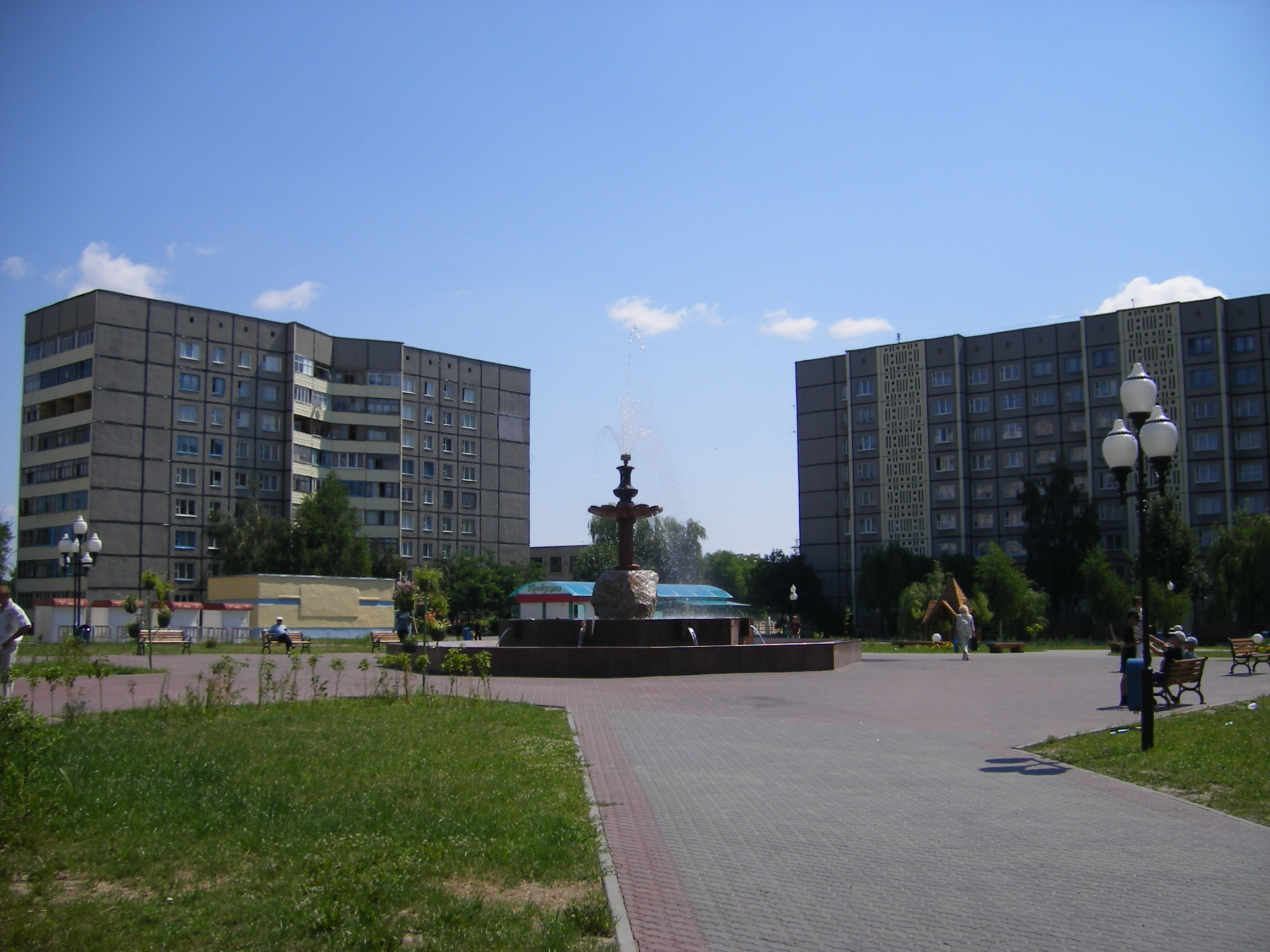 Mazyr, Vostochnyy